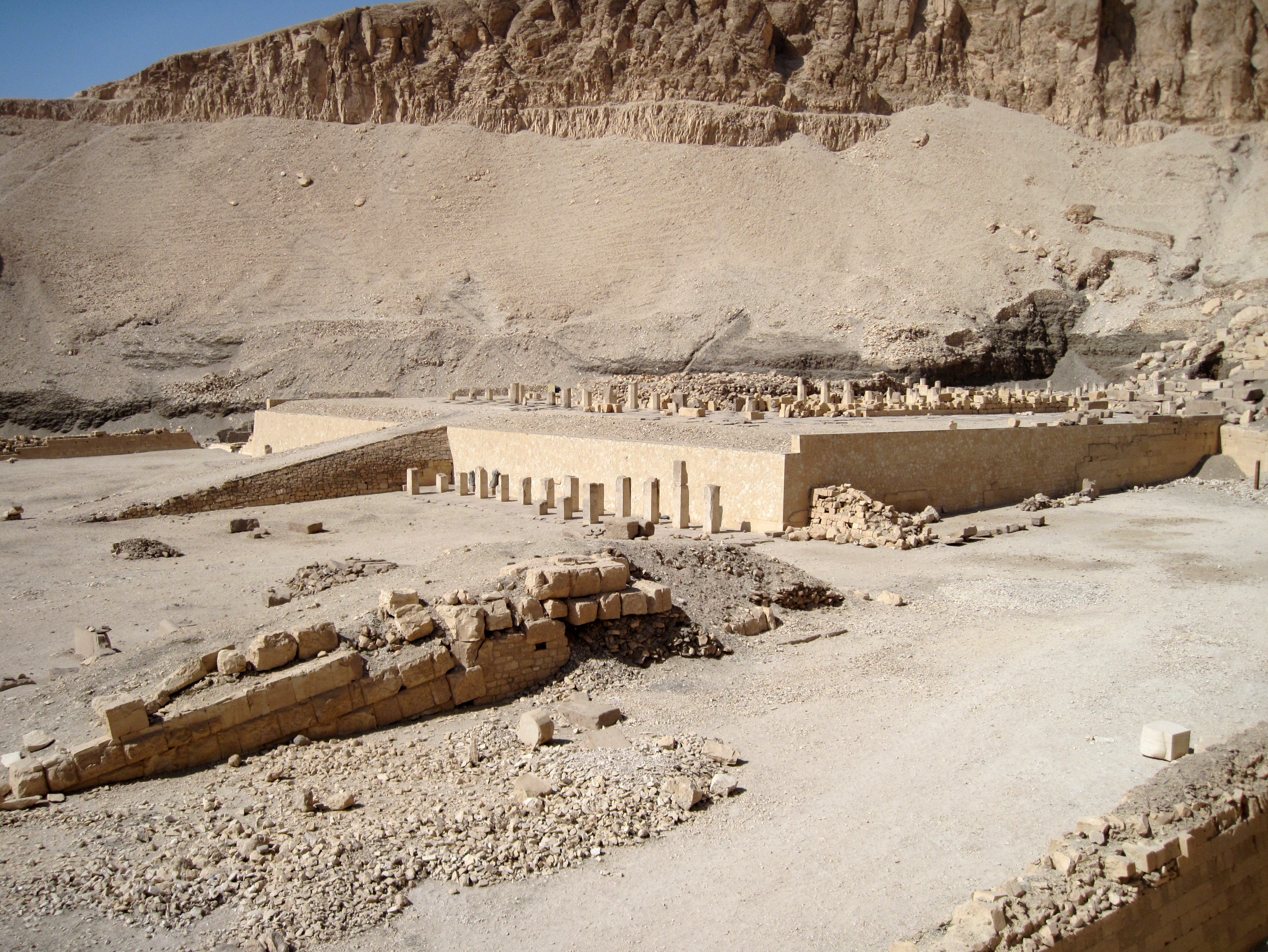 Reste des Totentempels des Mentuhotep II. in Deir el-Bahari nordwestlich von Luxor, Ägypten